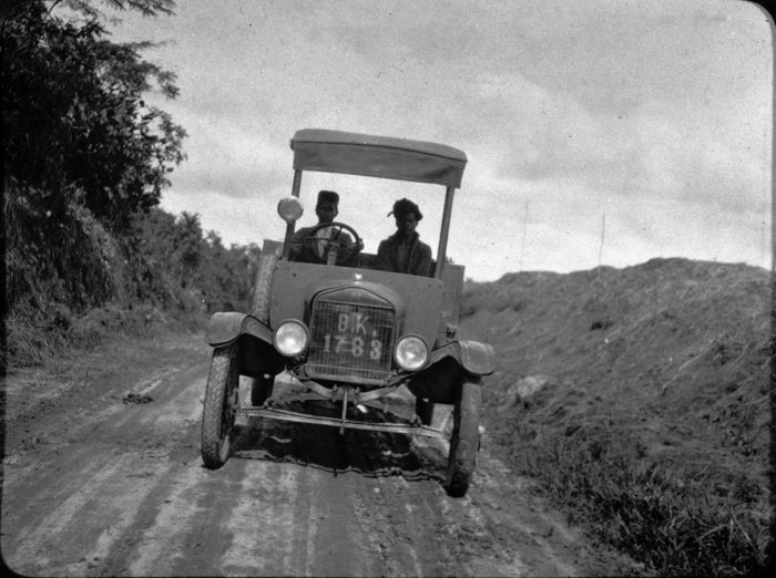 Foto. Automobiel op een rubberonderneming op Oost-Sumatra.